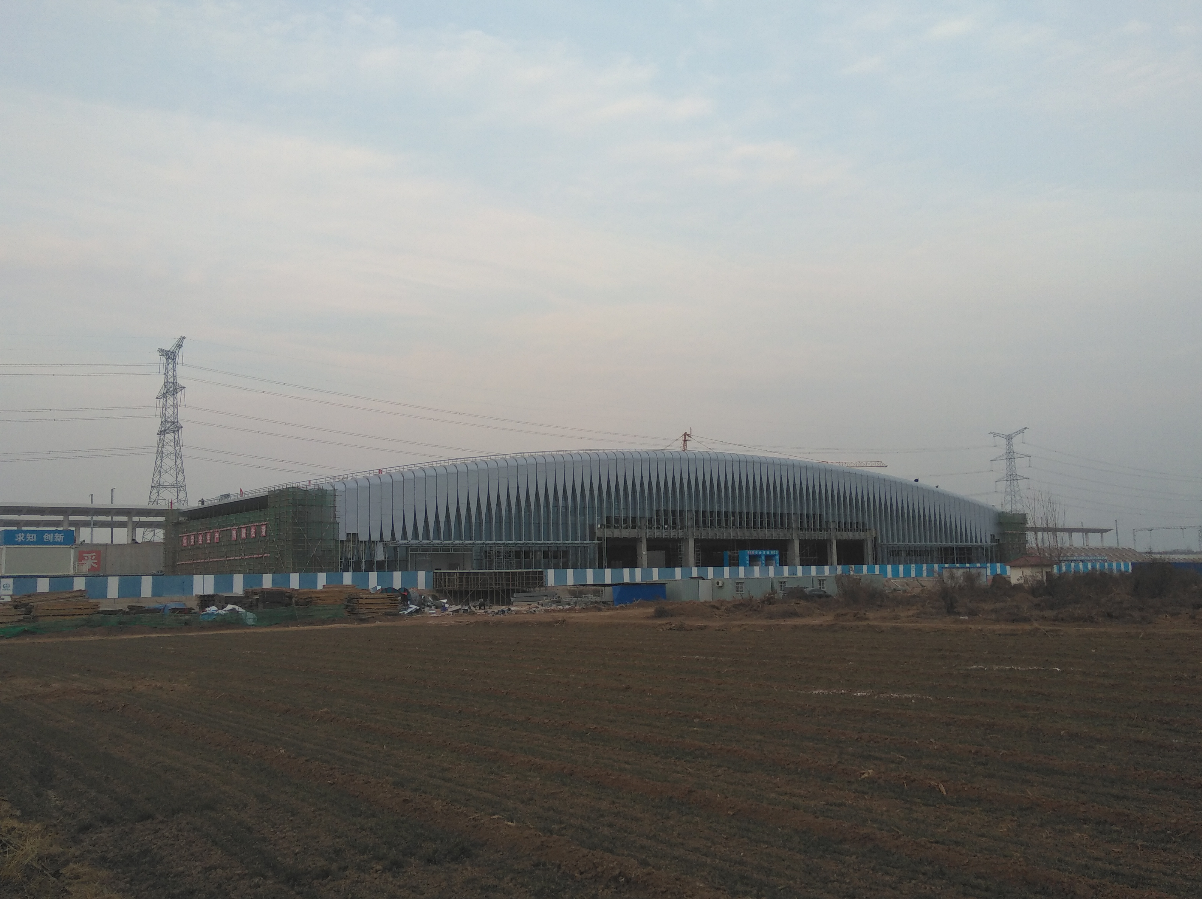 中文（中国大陆）: 兴建中的章丘北站（2018年1月）